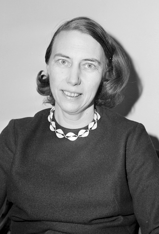 portrett, kvinne, jurist, politiker, sittende halvfigur. Rigmor Dahl Delphin (1908-1993) var ansatt som fotograf i ukebladet Alle Kvinner. Hennes negativarkiv ble i 2005 overført Oslo Bymuseum fra Gyldendal Norsk Forlag som var utgiver av bladet.